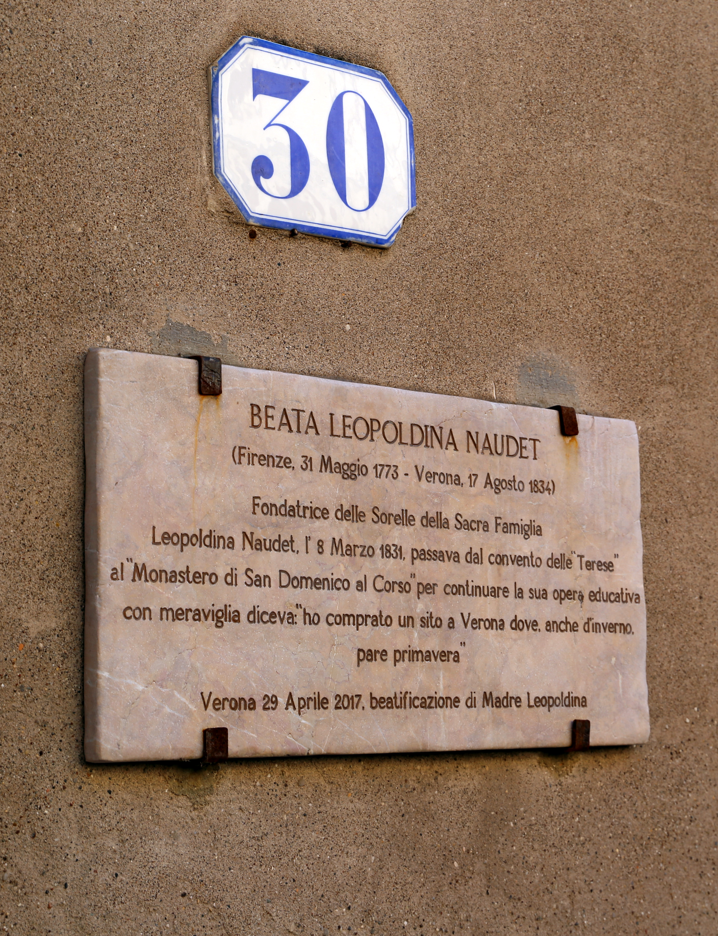 chiesa di San Domenico This is a photo of a monument which is part of cultural heritage of Italy.